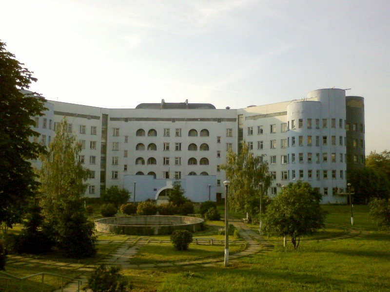 Пологовий будинок№2